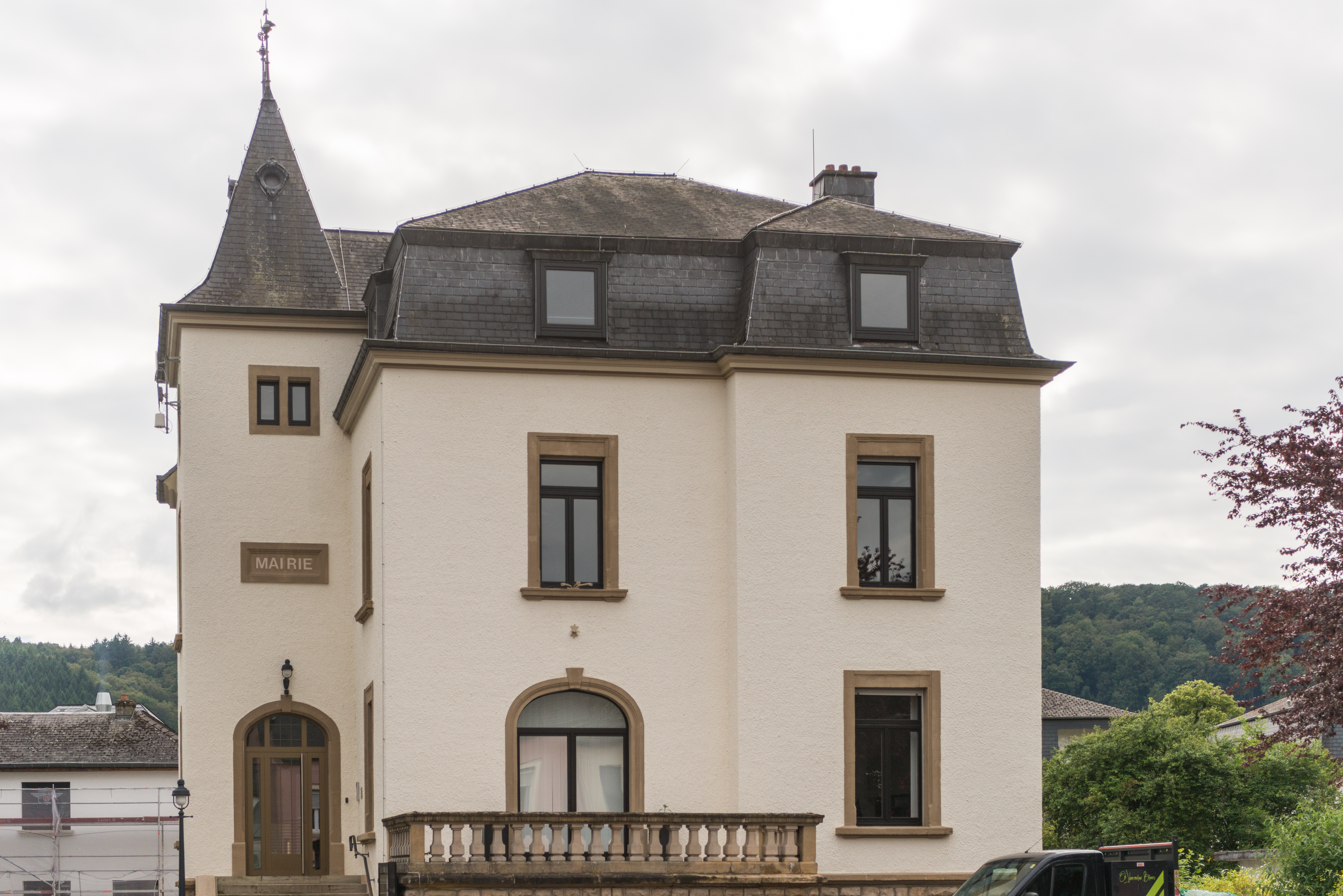 D'Märei vu Lëntgen, 2, Dikrecherstrooss.